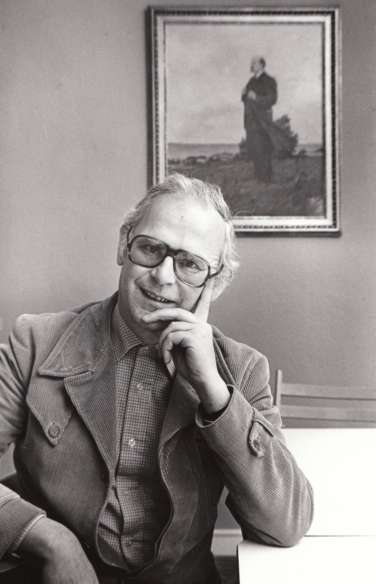 Jef Turf links-flamingant en voormalig lid van de Kommunistische Partij van België.